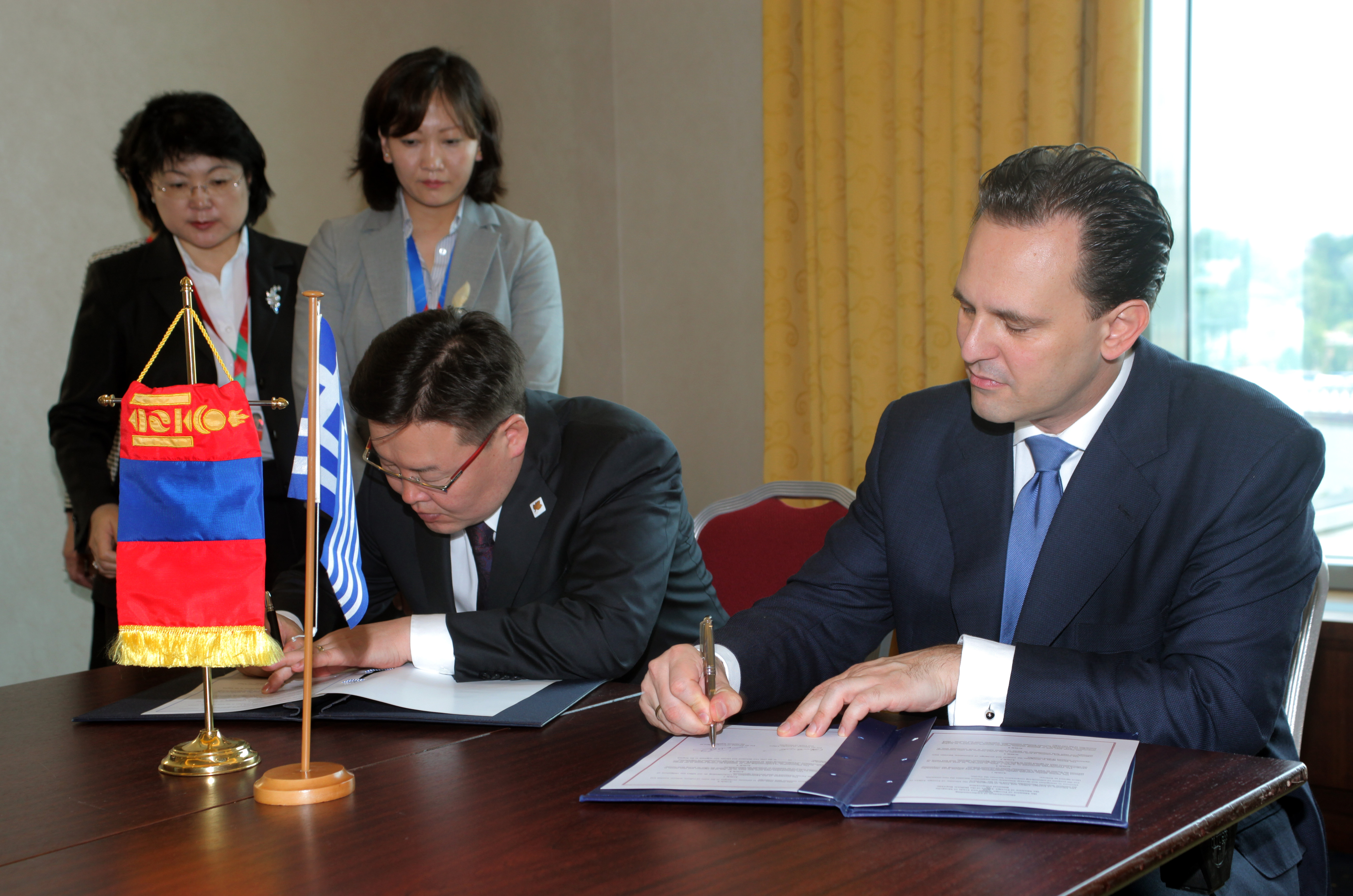 Στις 6-7 Ιουνίου 2011, ο Υπουργός Εξωτερικών Δημήτρης Δρούτσας συμμετέχει στη 10η Σύνοδο των Υπουργών Εξωτερικών των χωρών ASEM (Asia-Europe Meeting). On the 6-7 June 2011, Foreign Minister D. Droutsas is participating in the 10th ASEM Foreign Ministers' Meeting.